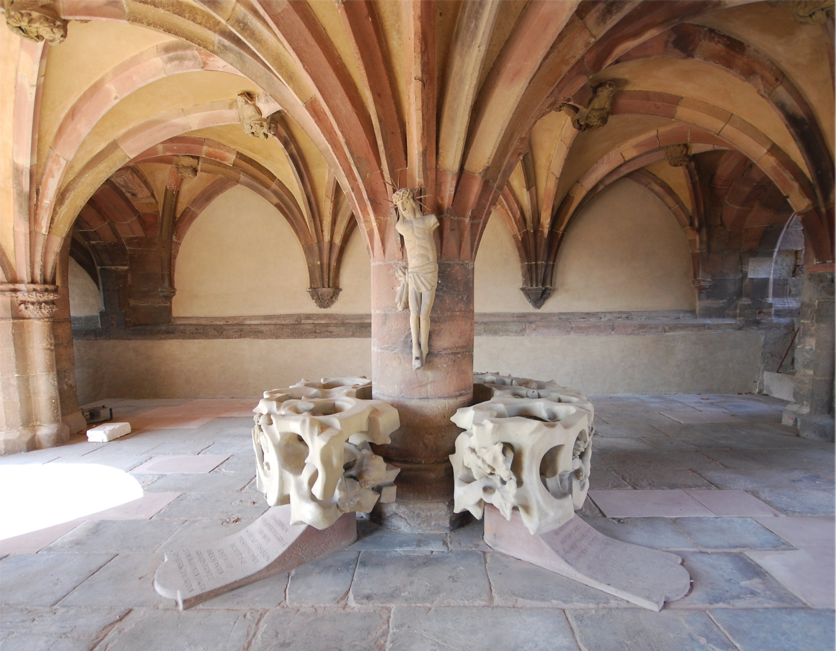 Krypta des Breisacher Münsters, Dornenkrone des Bildhauers H. Lutz